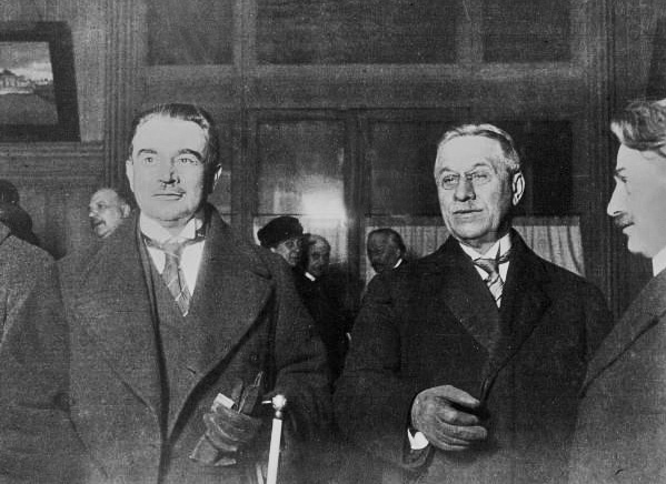 M. Merlin (à droite), gouverneur général de l'Indochine, et M. Carde (à gauche), gouverneur général de l'Afrique équatoriale française, à leur arrivée à la gare d'Orsay : photographie de presse